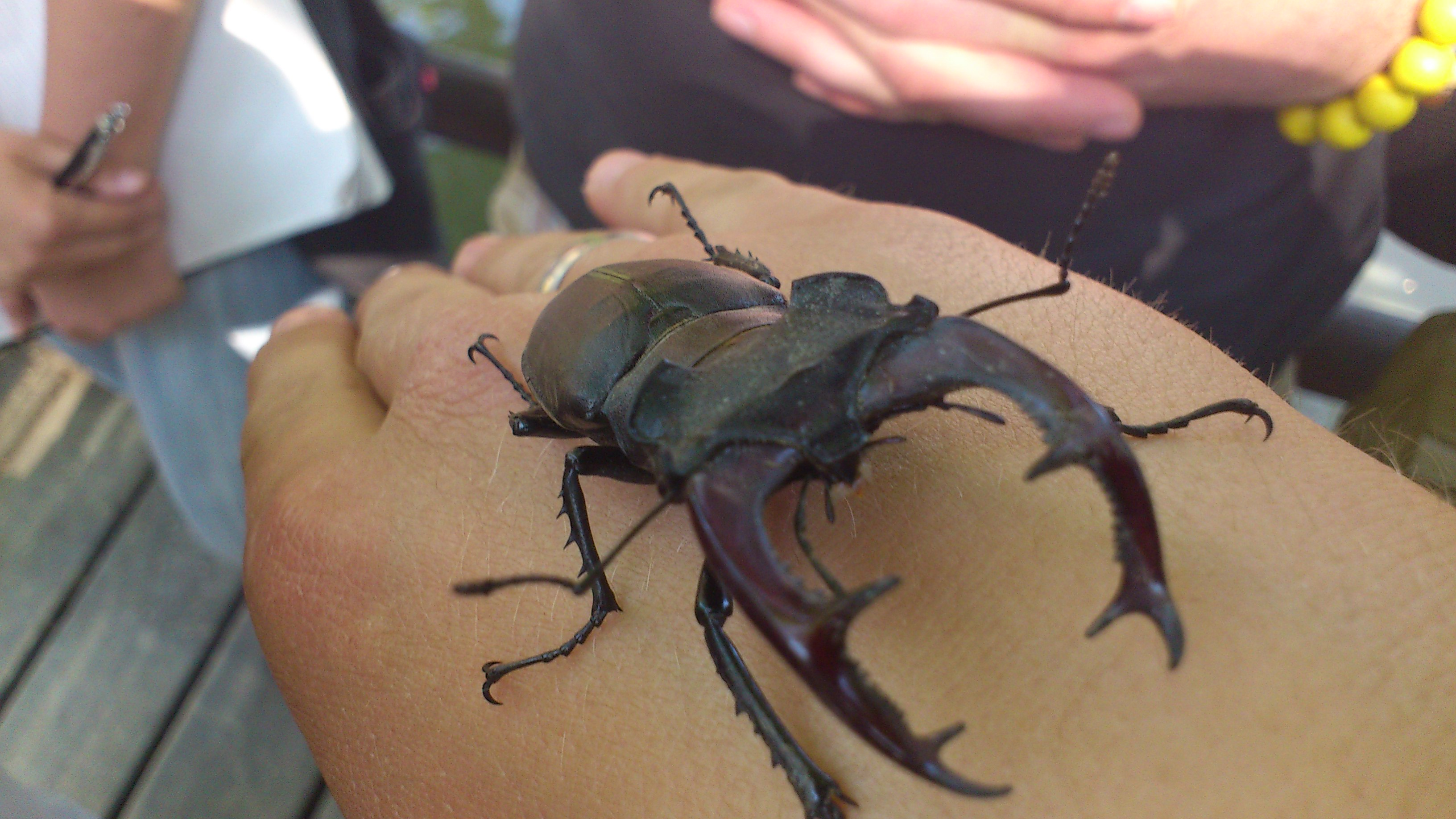 Roháč velký (Lucanus cervus)